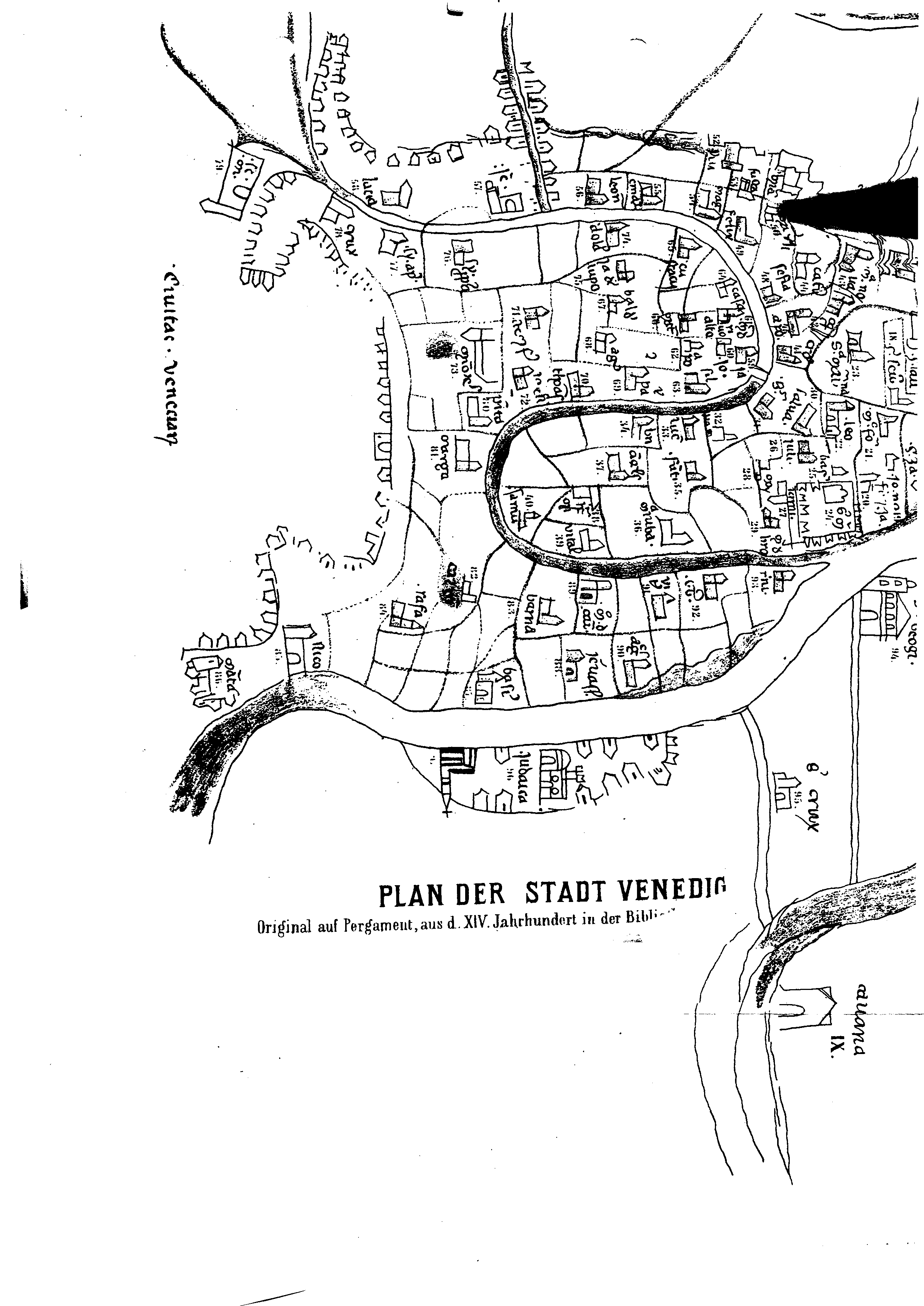 Bild der Stadt Venedig mit unbekanntem Entstehungsdatum (sicher aber aus dem 14. Jahrhundert) mit ursprünglicher Perspektive von Westen gemalt. Die Überschriftenzeile des Herausgebers (Albert Camesina Ritter von Sanvittore) wurde im Gegensatz zu den Titulaturen der Gotteshäuser (vom vermutlich franziskanischen Autor aus dem 14. Jahrhundert) zum besseren Vergleich mit den anderen Stichen eingenordet. Sonstiges: Bildtitelschriftzug wurde eingenordet, um ihn lesbar zu halten, nachdem das Bild um 90 Grad gedreht worden ist.